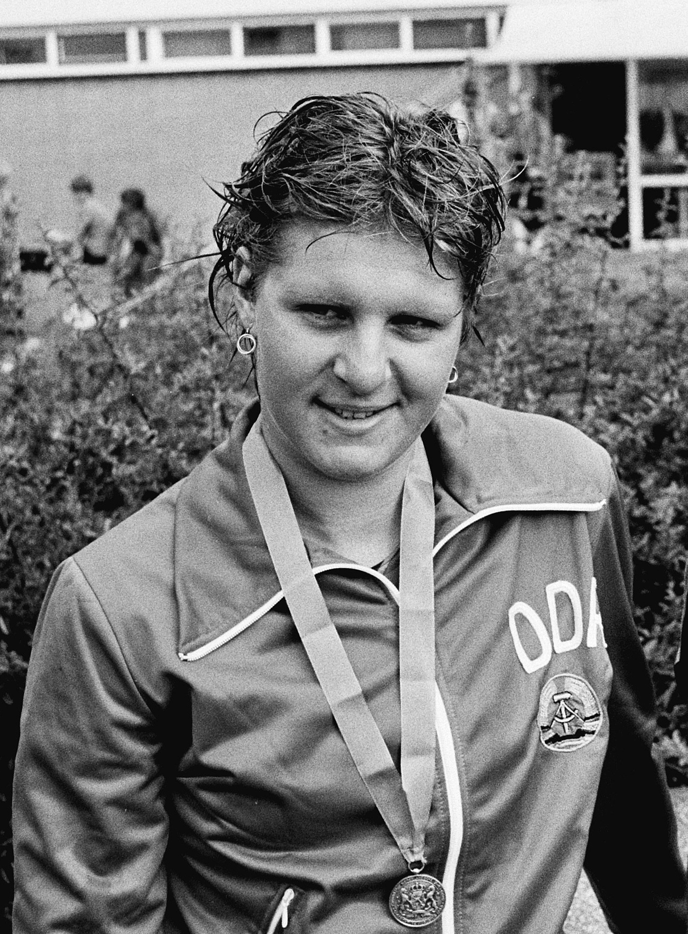 Birgit Treiber